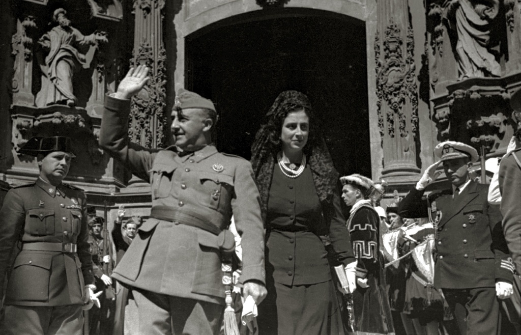 Título original: Visita de Francisco Franco y su esposa, Carmen Polo, en un acto religioso en la iglesia de Santa María (5/6) Localización: San Sebastián (Guipúzcoa)